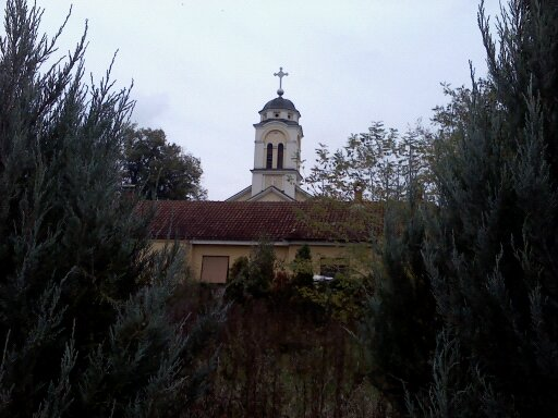 Srpski (latinica): Crkva Rodjenja Presvete Bogorodice u Batočini